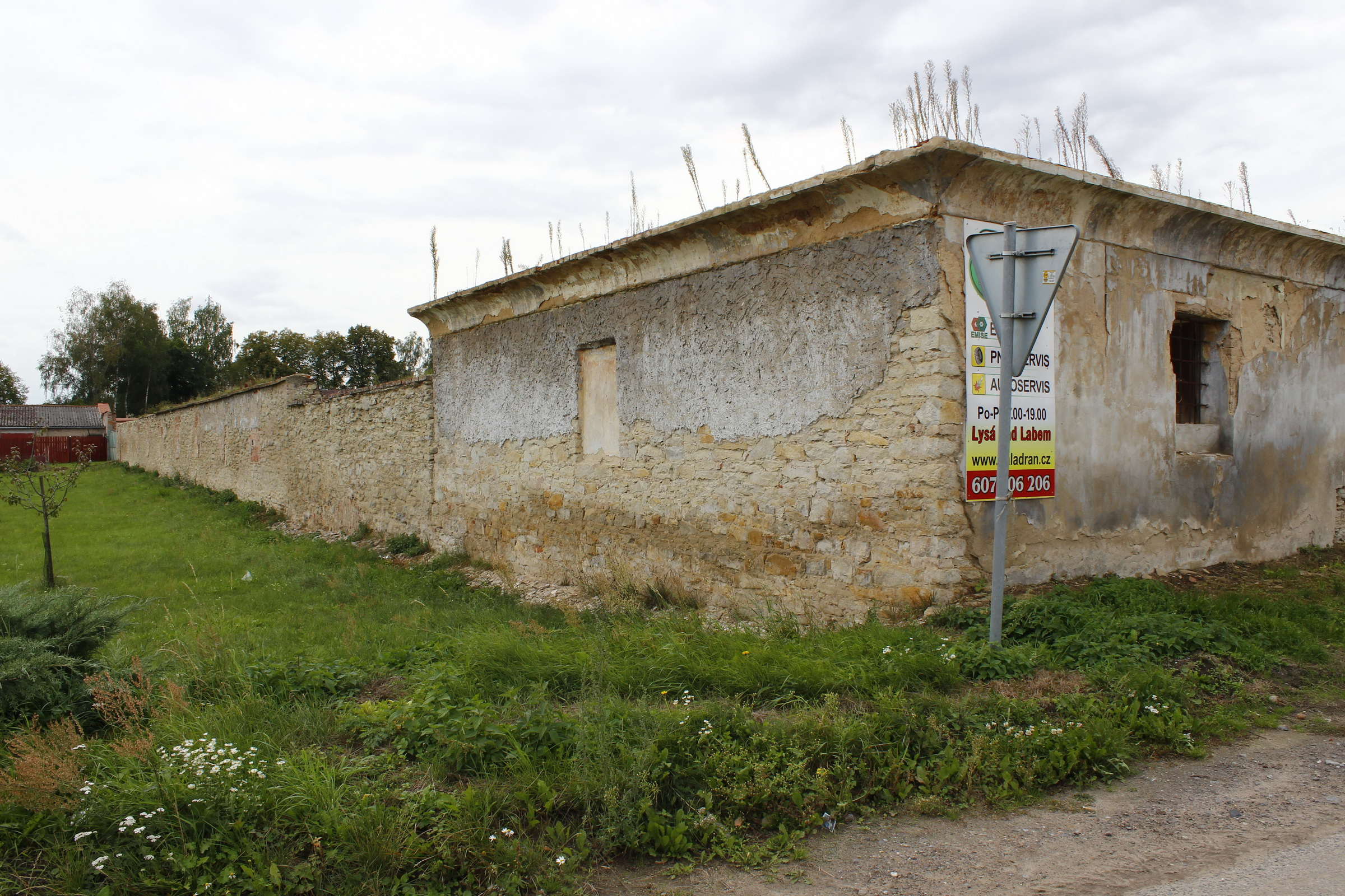 Stará Lysá, poslední zbytky dřívějšího statku "Alžbětín".